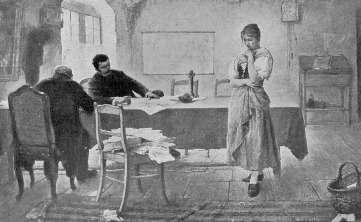 Baditz Ottó: Kihallgatás (olajfestmény, 1890)